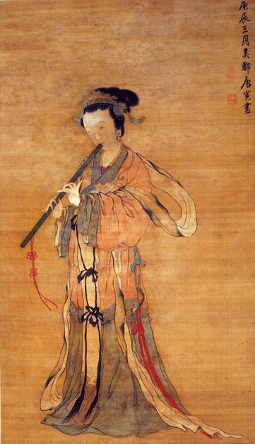 《吹箫仕女图》，南京博物院于二十世纪六十年代征集的文物。